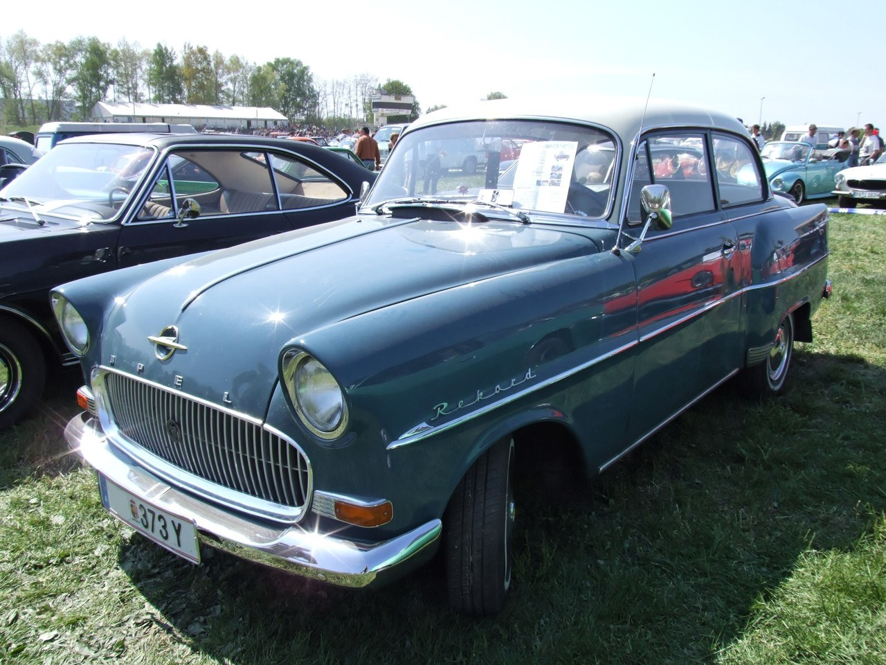 Opel Rekord Olympia Baujahr 1957 45 PS 1483 ccm